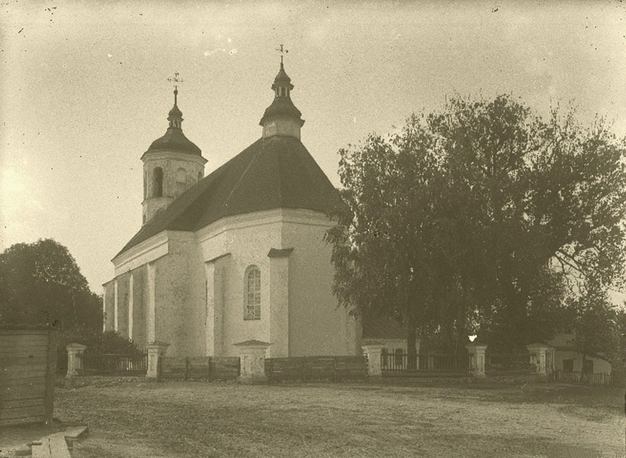 Беларуская (тарашкевіца): Клецак (Klecak). Фарны касьцёл (Fara)